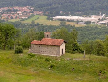 Oratorio di San Bernardino, Casalzuigno